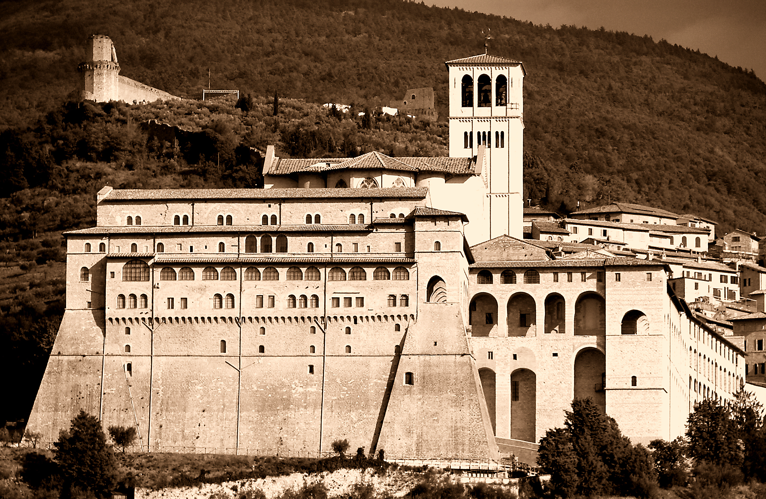 La basilica di San Francesco d'Assisi